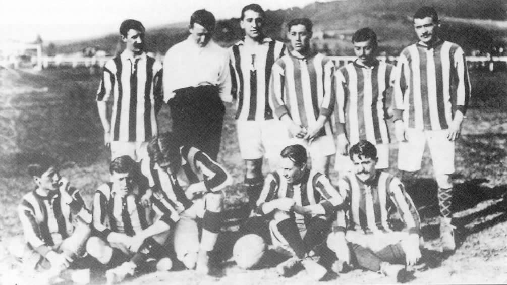 Athletic club campeón 1911